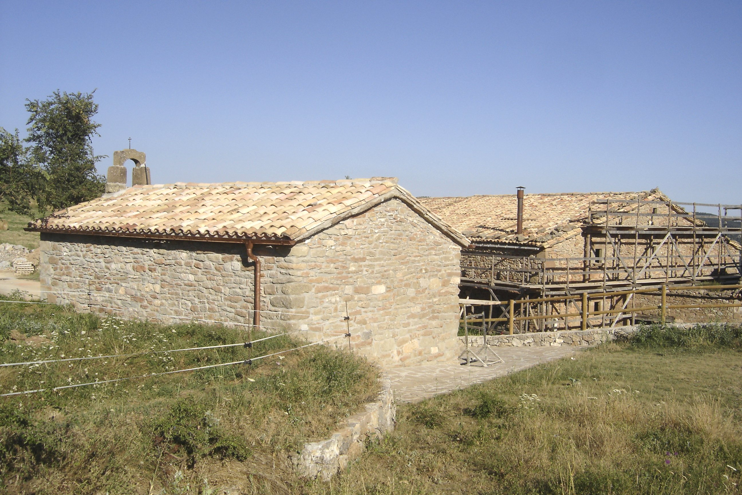 Sant Martí de Cavallera (Odèn) (Solsonès)